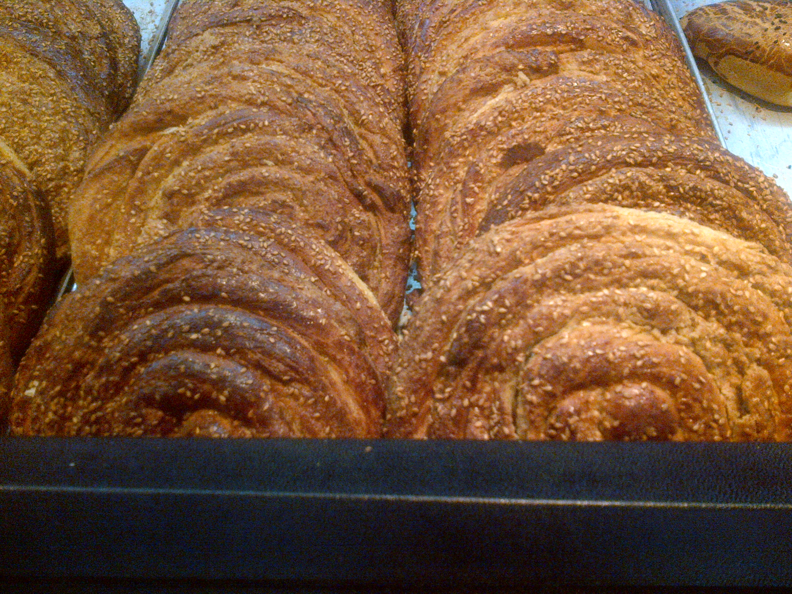 Tahinli çörek o çörek con tahina en una panaderia turca.